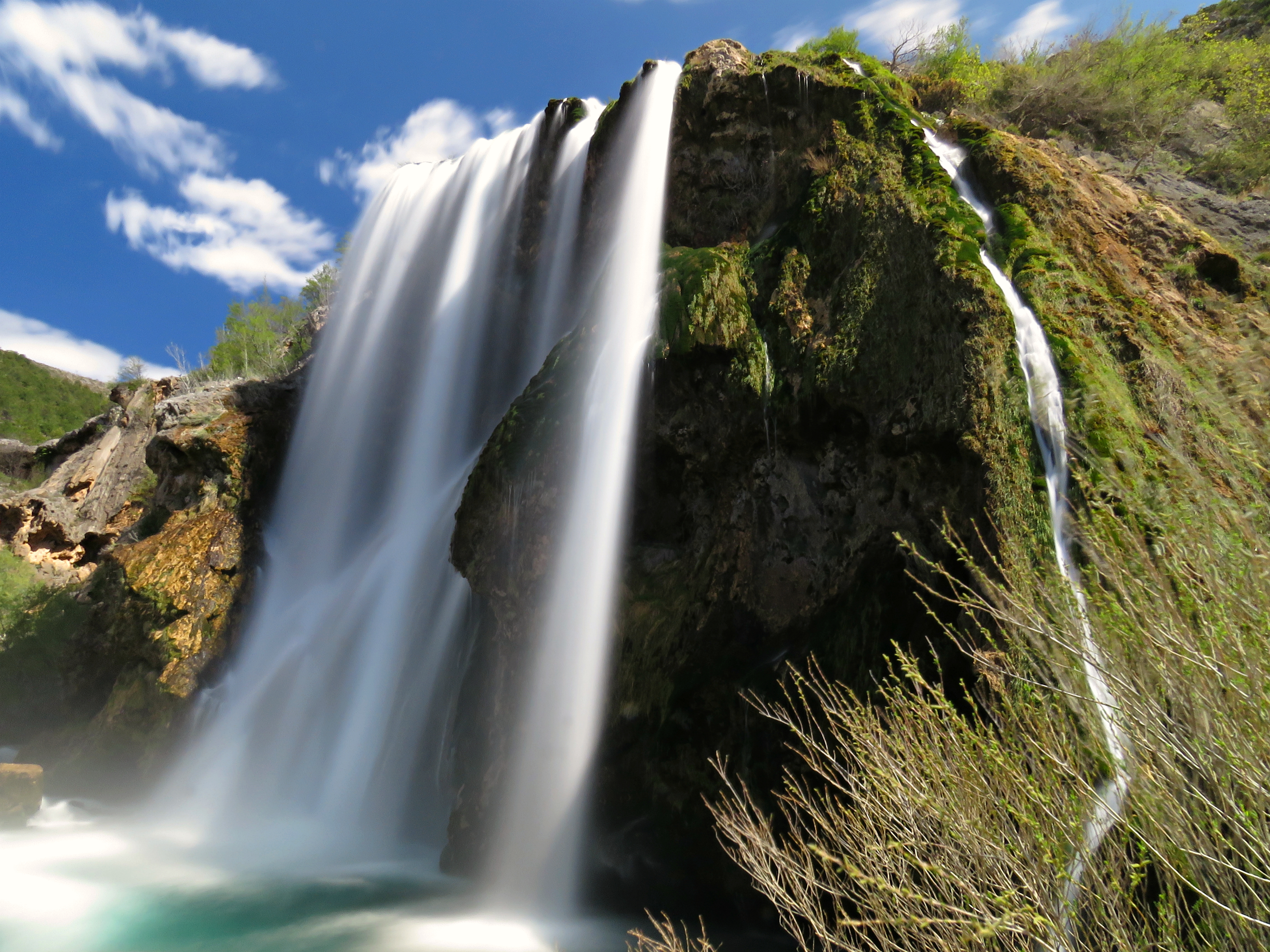 Rijeka Krčić zaštićena je od 1964. godine i zajedno s rijekom Krkom čini jedinstven hidrografski sustav s obiljem krško-hidrografskih i morfoloških fenomena. Slap Krčić ima i svoju legendu. Nekada je na brdu lijevo od slapa postojala utvrda koja je sluzila za obranu mosta. Legenda kaže da će ljudi ponovo izgraditi most kada Krčić više nikada ne presuši i kada ljudi prestanu međusobno ratovati. This is a a photo of a natural area in Croatia with ID: NP03